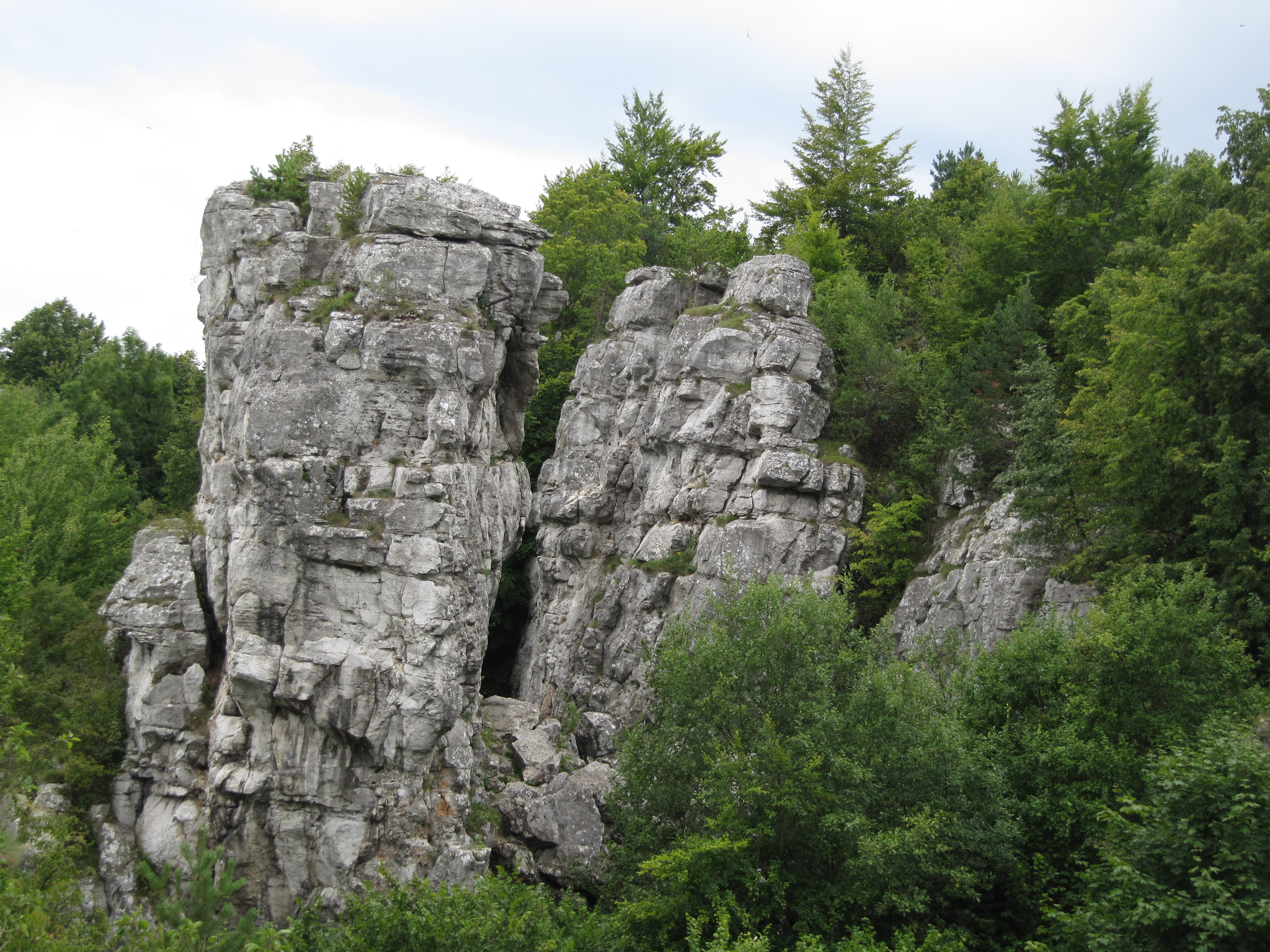 Dreveník, národní přírodní rezervace, Slovensko, okres Spišská Nová Ves.